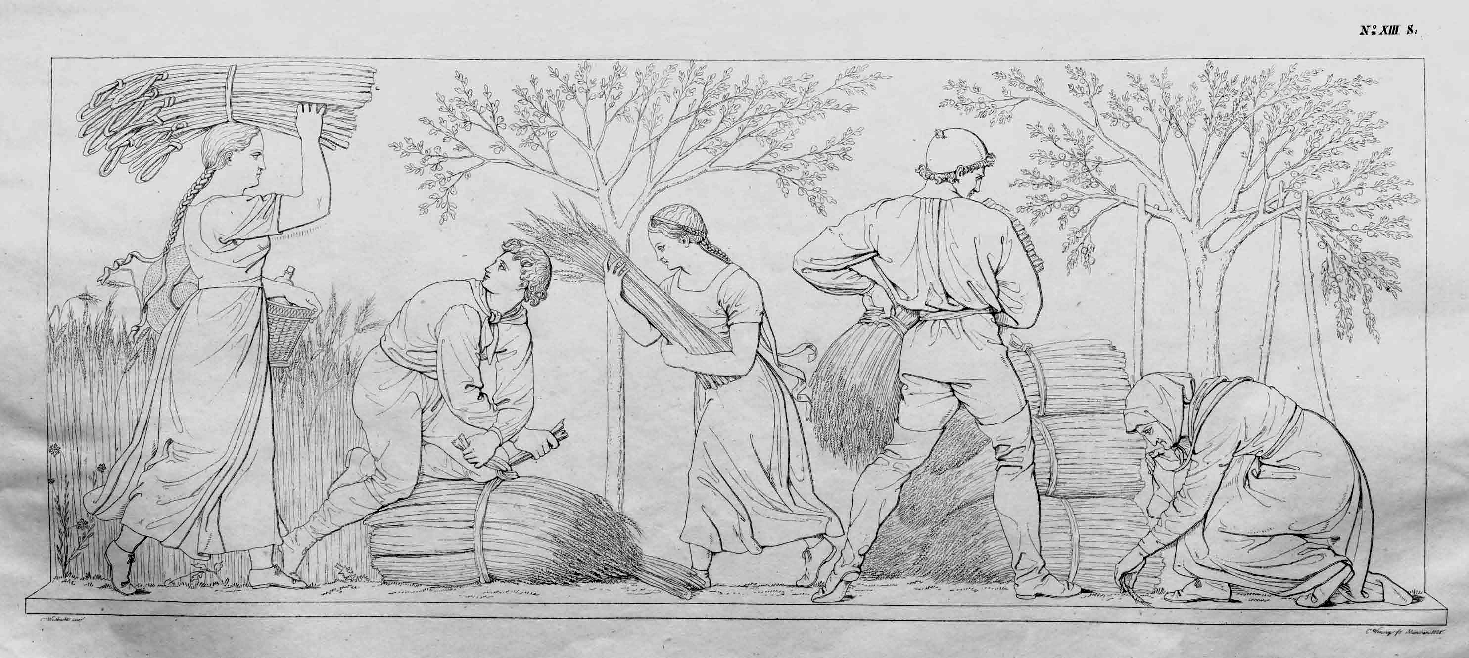 Blatt aus der Buchausgabe in Breitfolio von Conrad Weitbrechts graphischem Zyklus „Die vier Jahreszeiten“, das im Vierjahreszeitenfries von Schloss Rosenstein in Stuttgart realisiert wurde (teilweise mit Varianten).